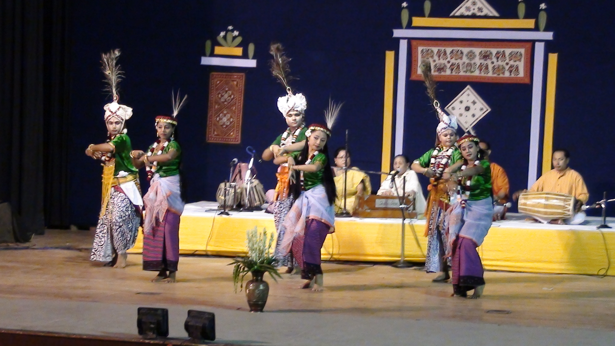 மணிப்பூர் பிரதேசத்தில் மிகப் பழமையான மகிழ்விக்கும் ஒரு ஆடல் ஆகும்.